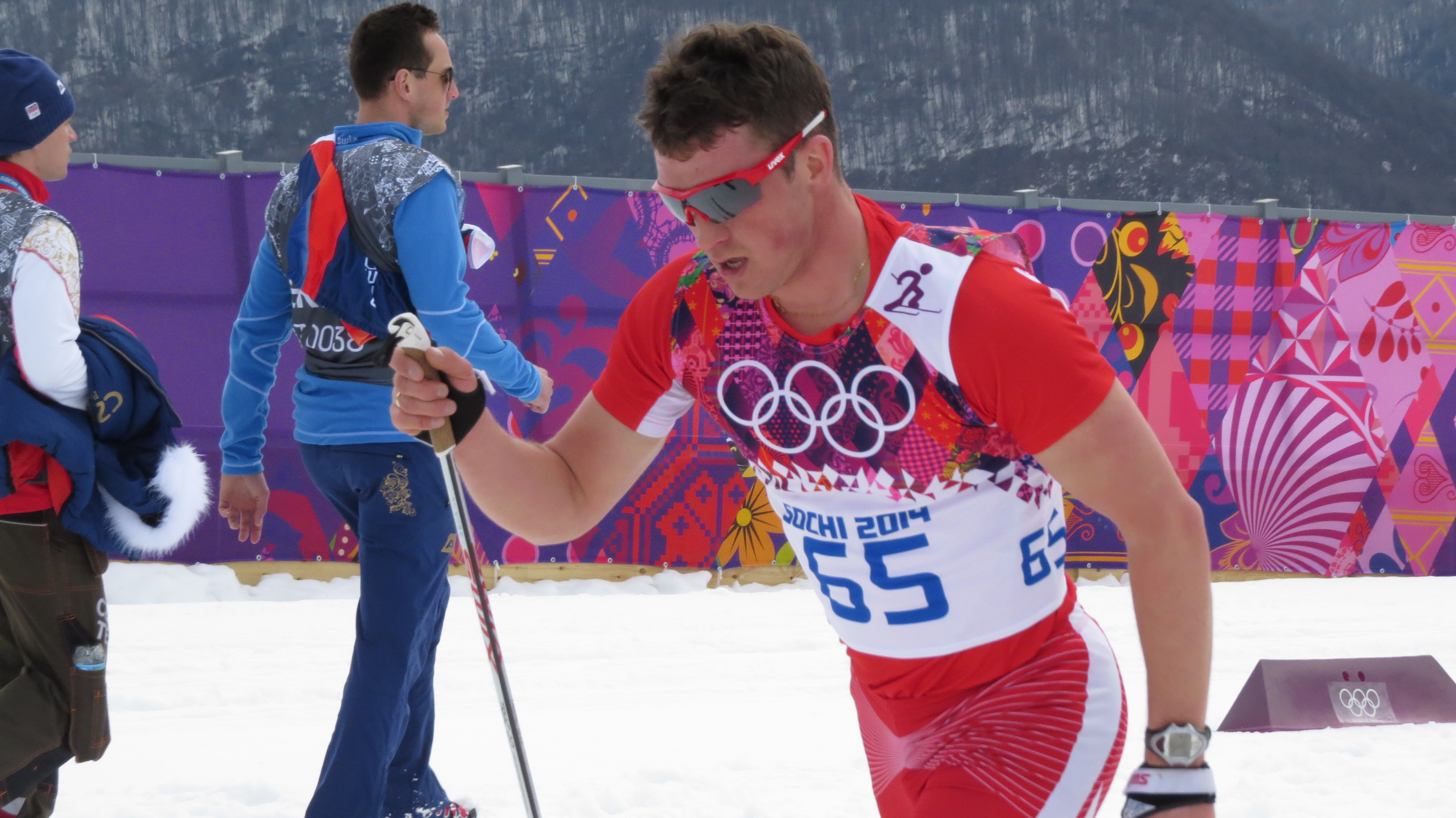 Лыжные гонки на зимних Олимпийских играх 2014 — 15 км классическим стилем (мужчины)